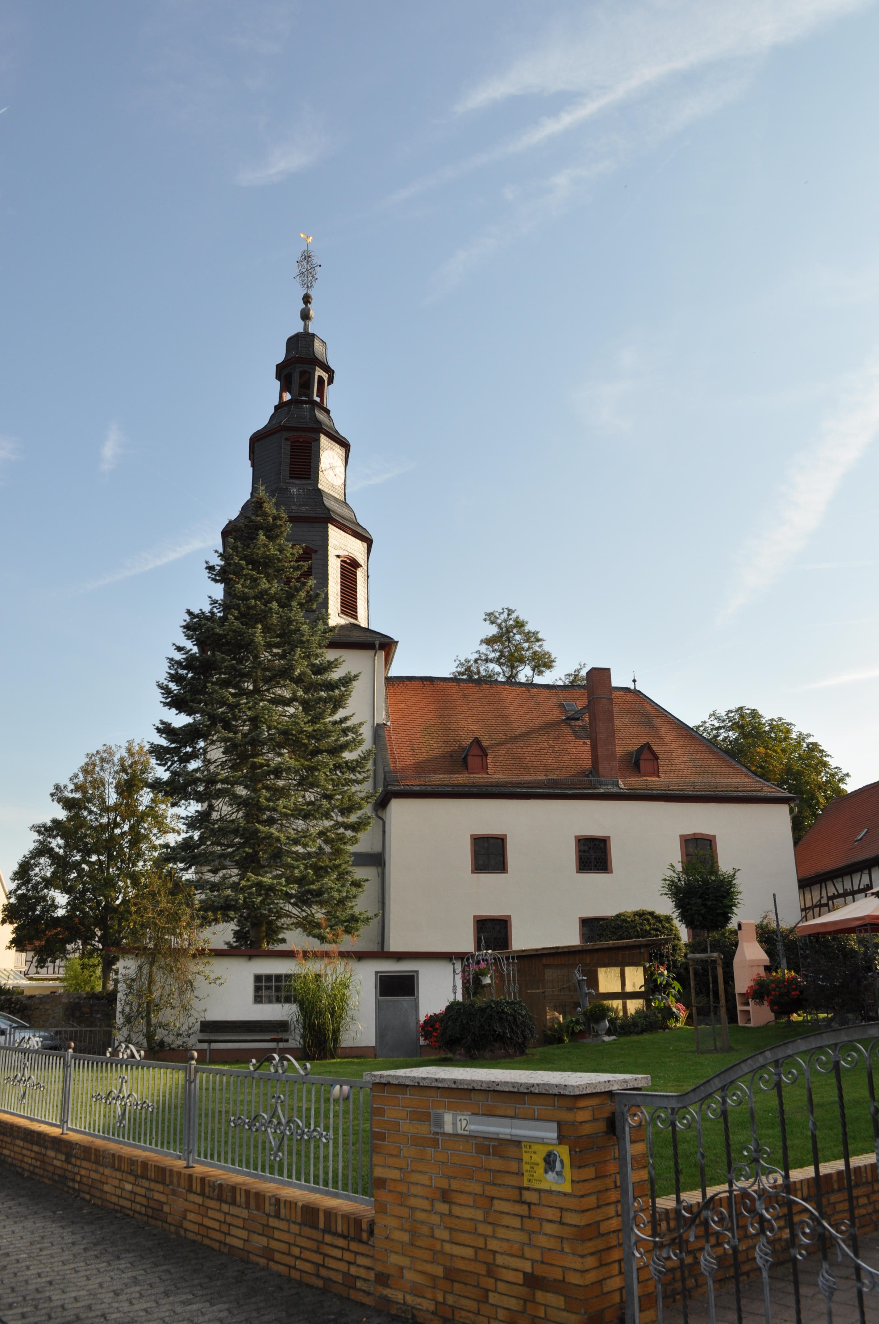 Kirche in Nieder-Rosbach